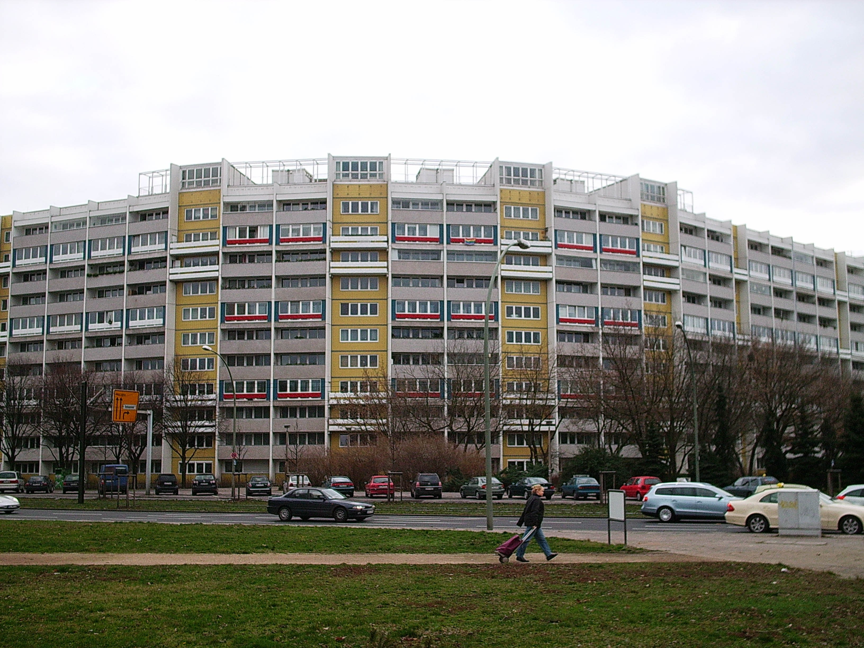 Berlin-Friedrichshain, Platz der Vereinten Nationen (Berlin) Nr. 3-12, im Volksmund "Bumerang", Foto von Martin Püschel, 01/2007